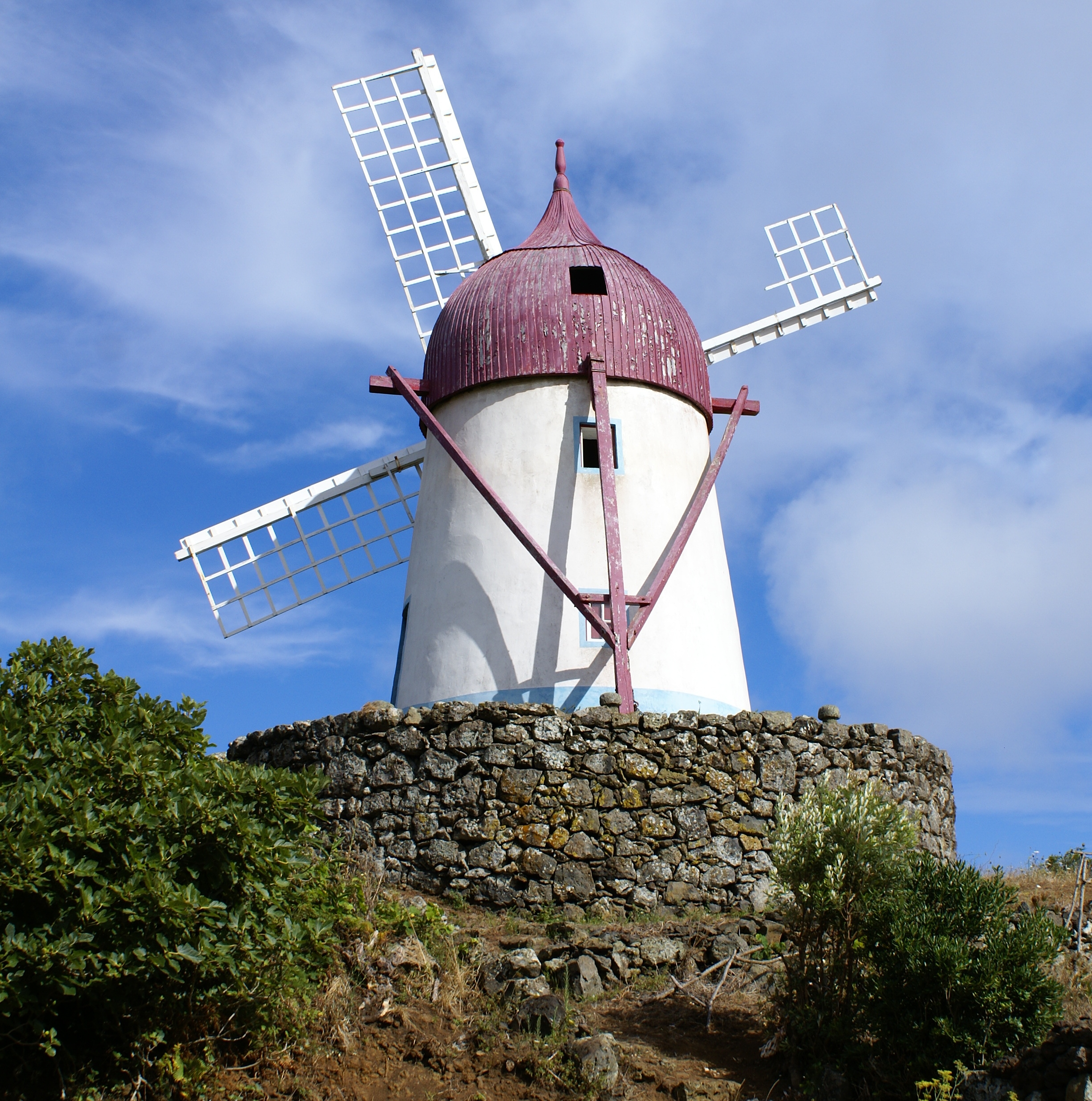 Manuel Gaspar, moinho típico, Santa Cruz da Graciosa, ilha Graciosa, Açores, Portugal